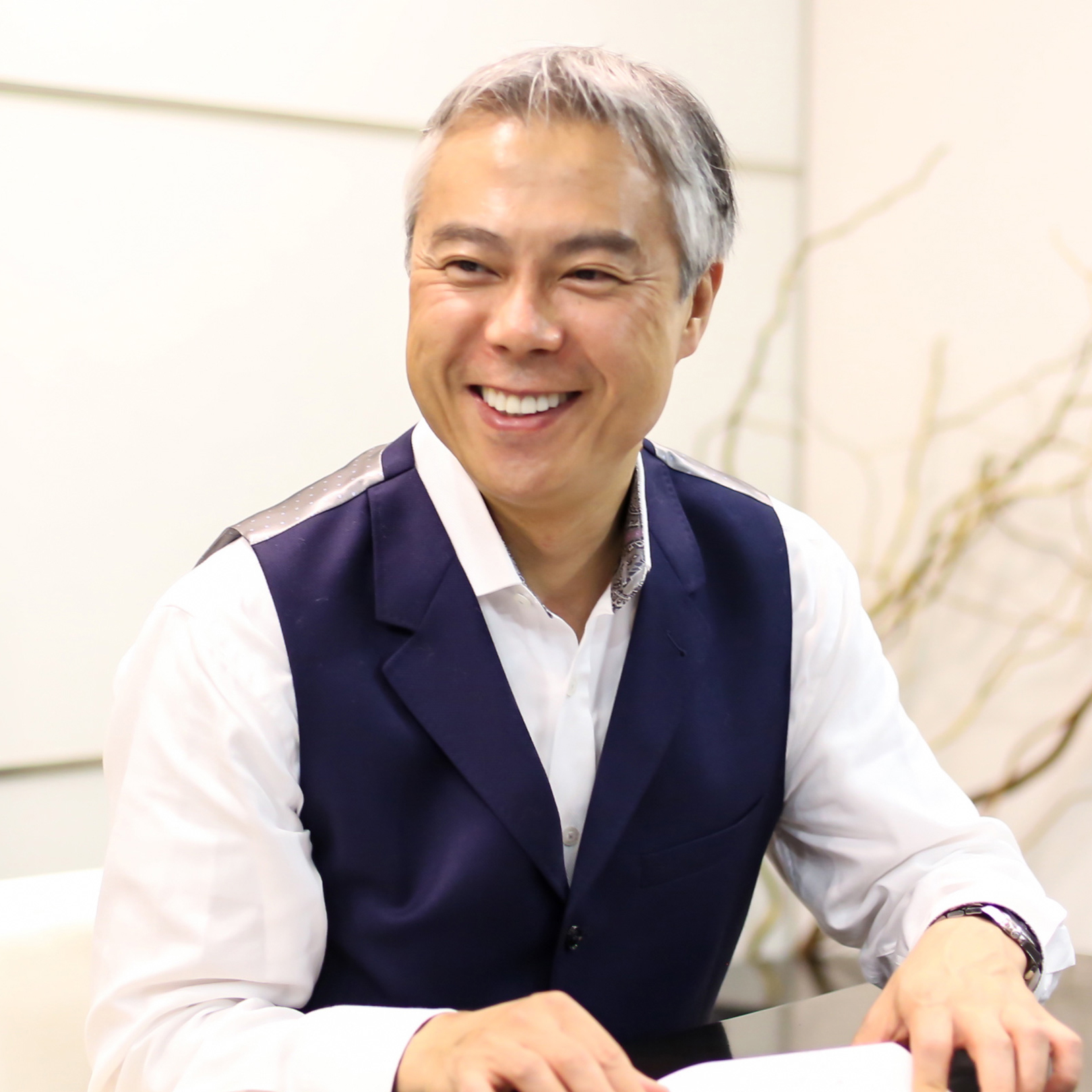 植村浩/2016年撮影